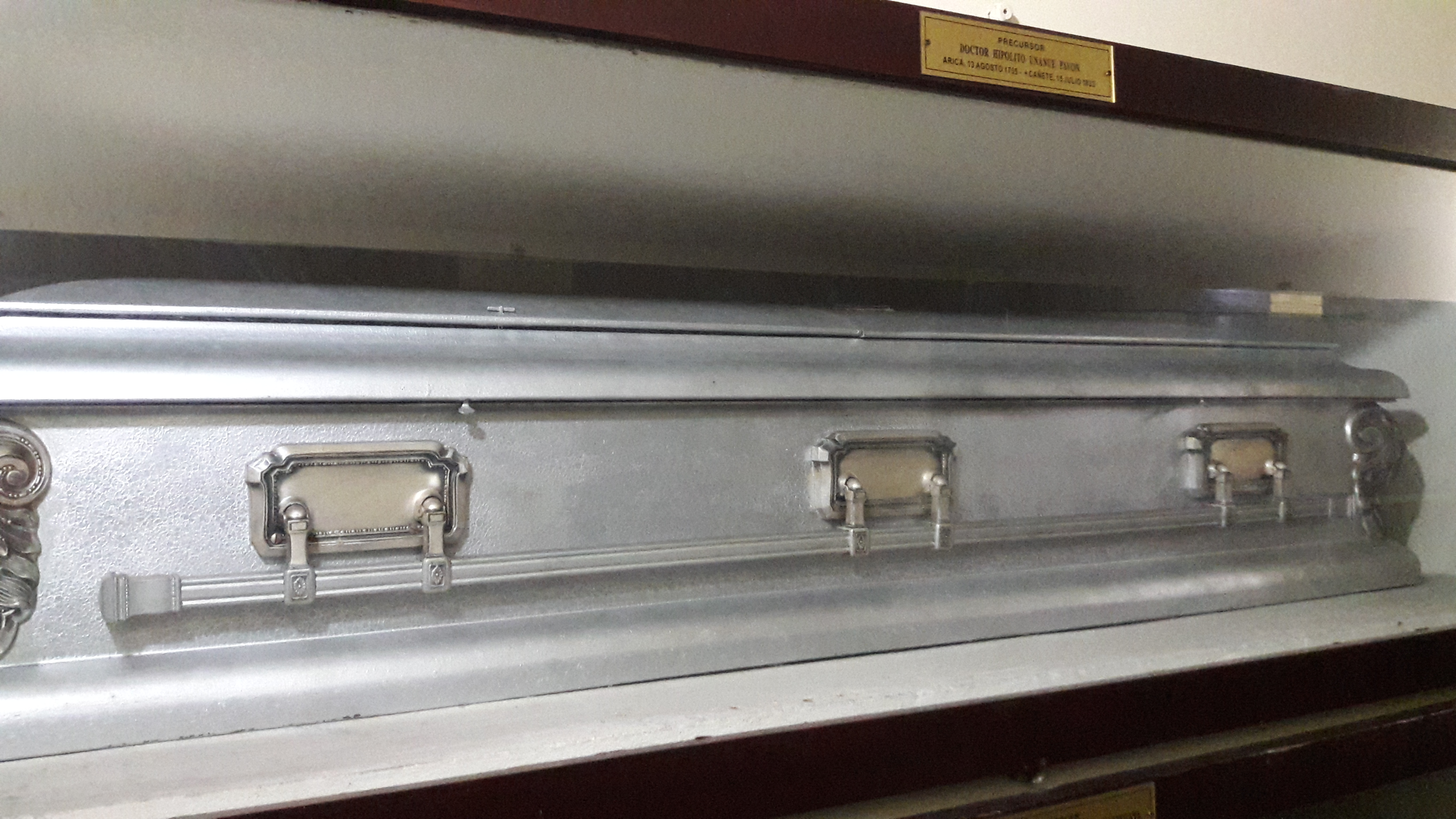 Tumba de Hipólito Unanue